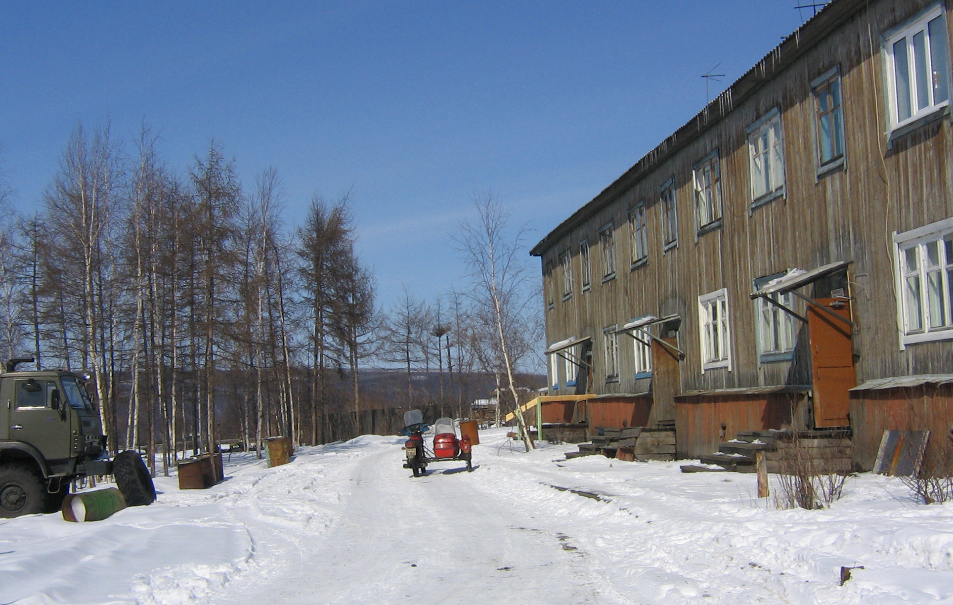 Улица Увачана